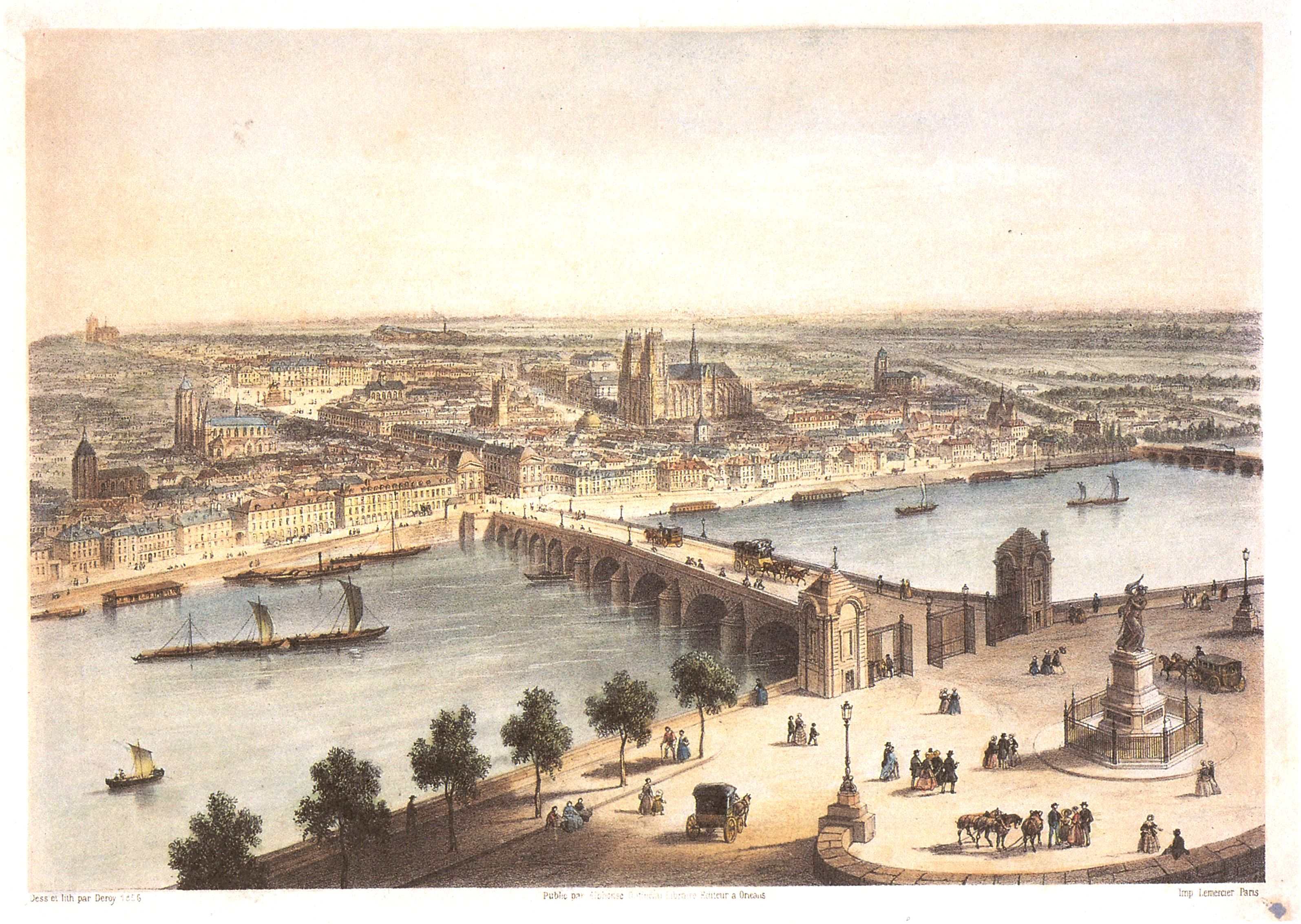 Pont Royal, vue aval, Orléans, Loiret, France